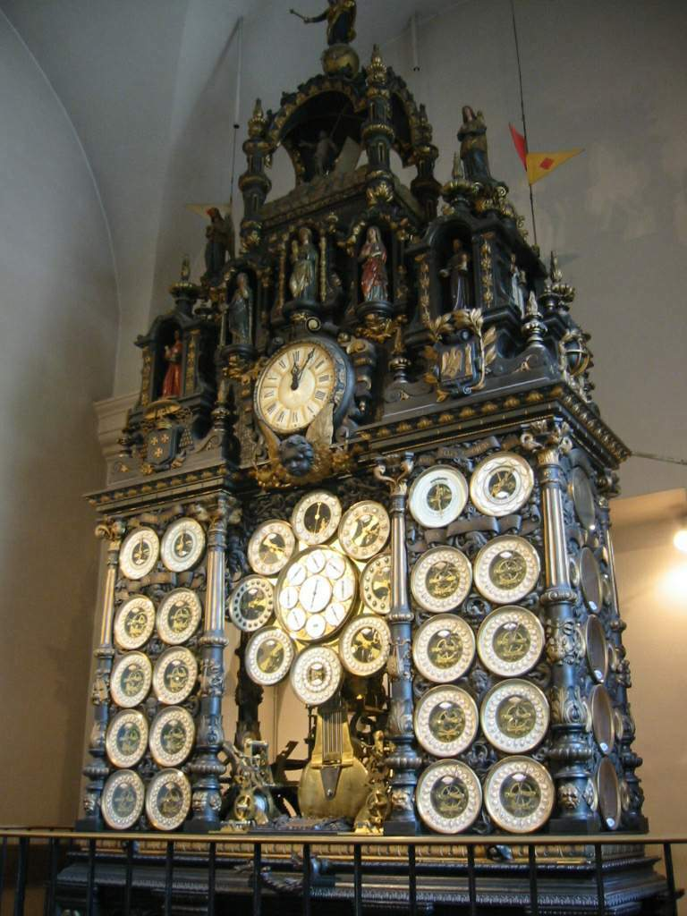 Horloge astronomique de l'église St Jean à Besancon